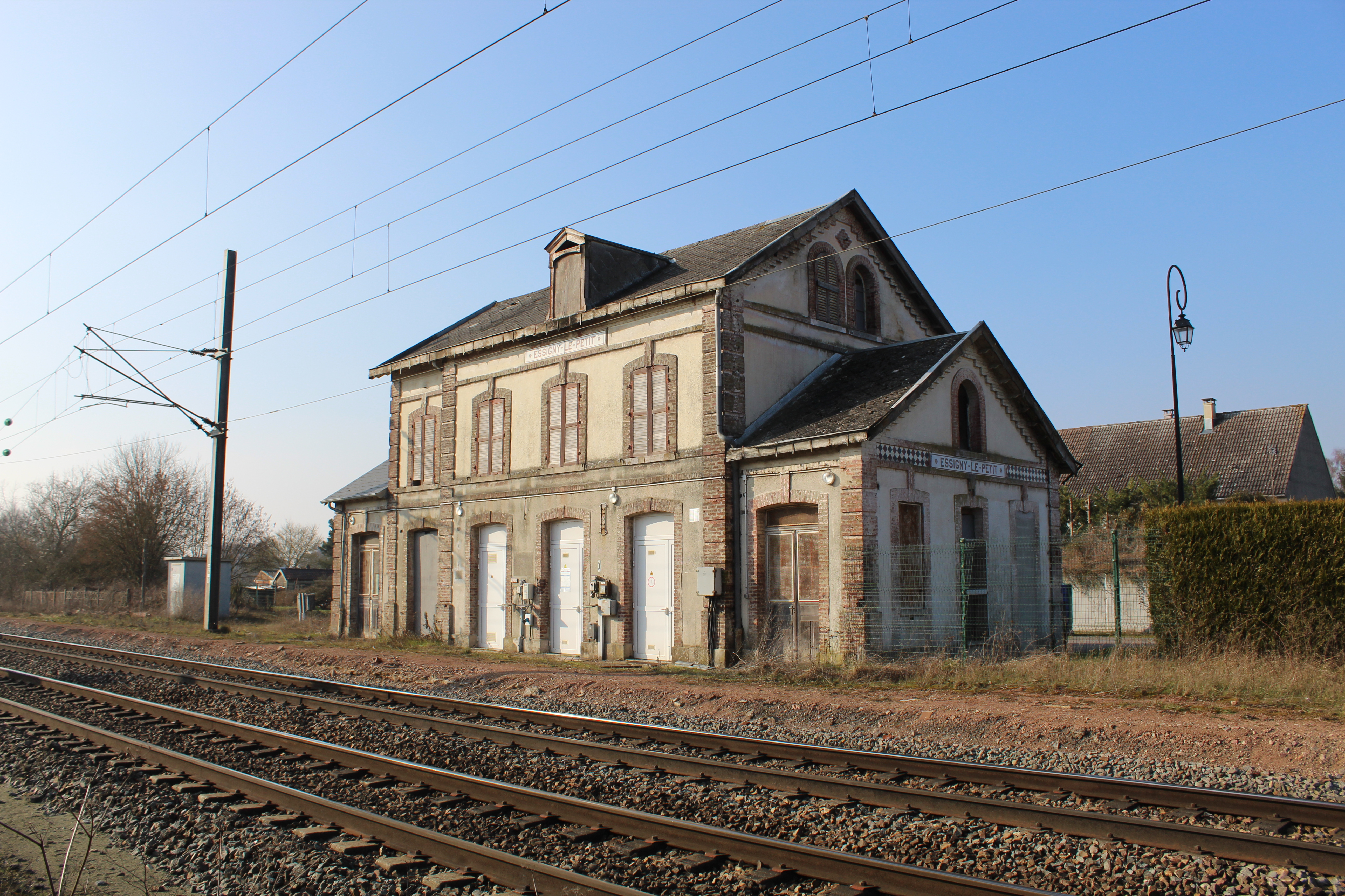 La gare d'Essigny-le-Petit.